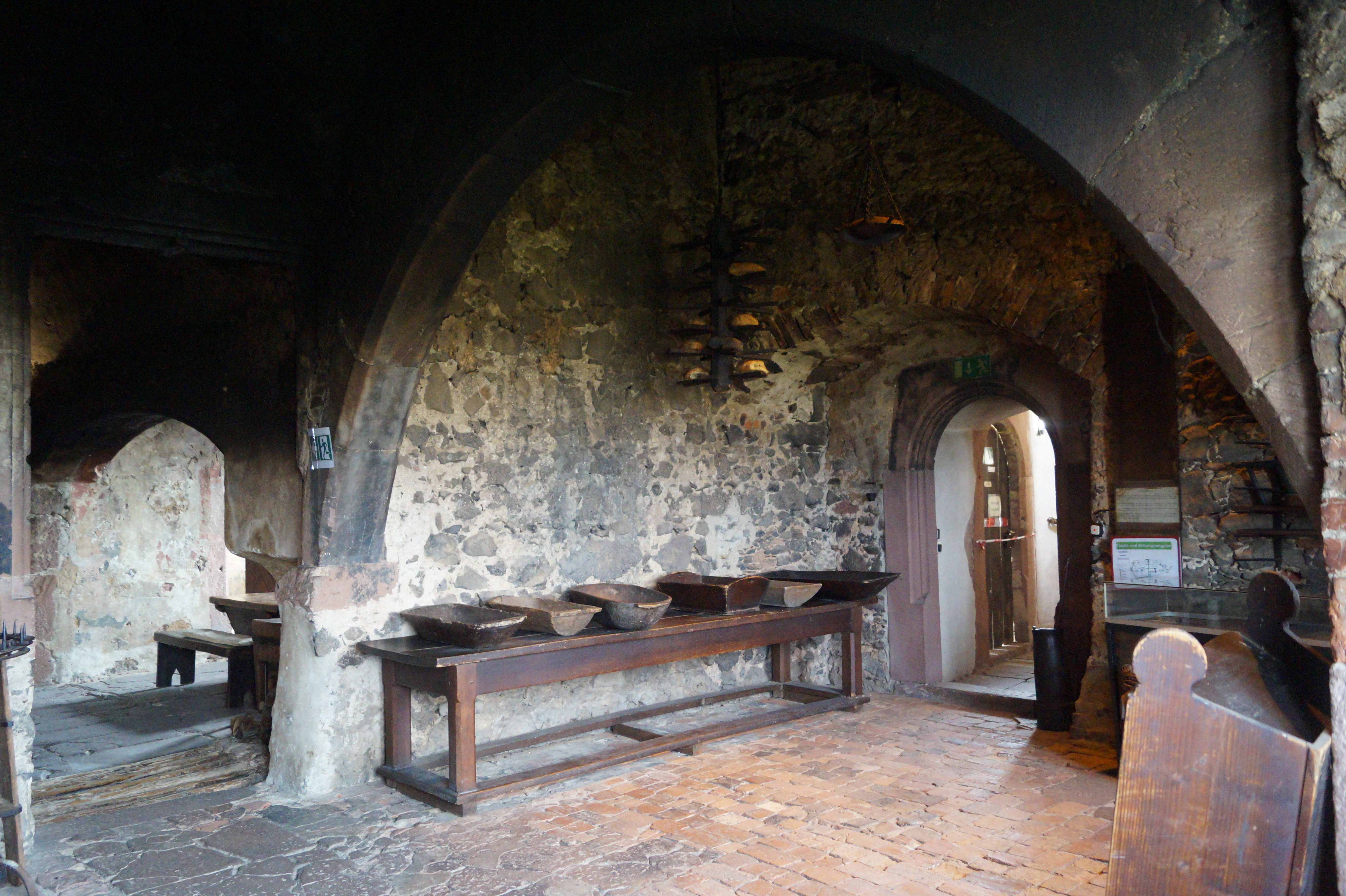 Burg Ronneburg, Hessen, Innenraum des Backhauses (Erdgeschoss), auffällig die rußgeschwärzten Wände.